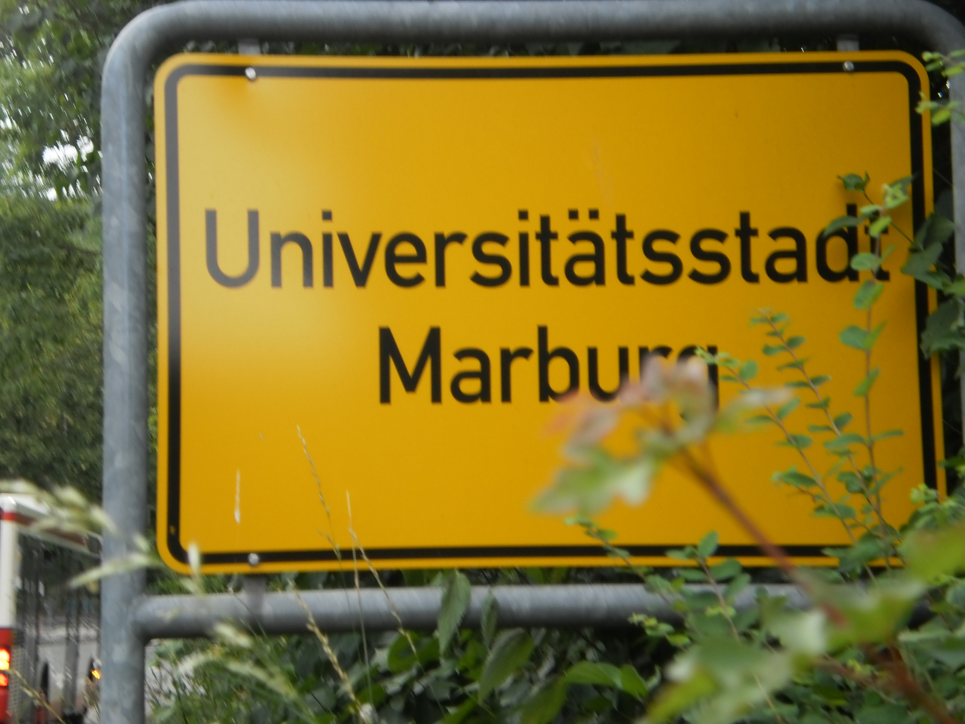 Universitätsstadt Marburg auf einer Ortstafel nahe der Stadtwerke in der Strasse "Am Krekel", mit hinten gerade vorbei fahrendem Stadtbus.